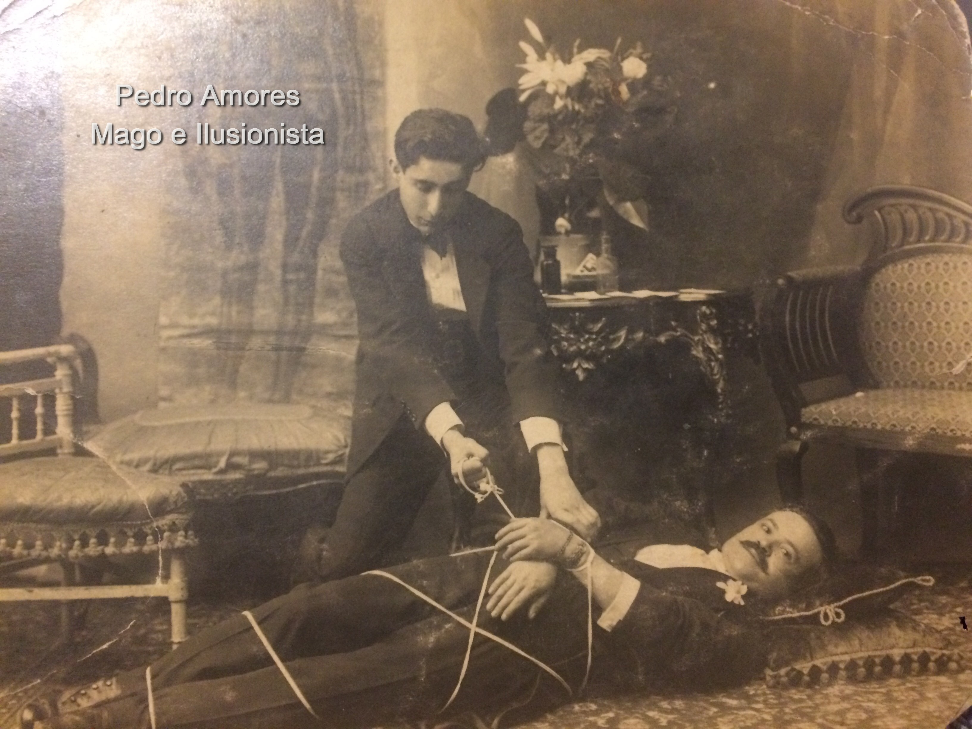 Magia de escena con tecnicas de Escapismo